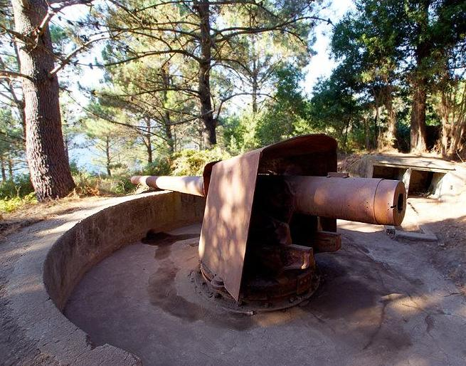 Bateria J3